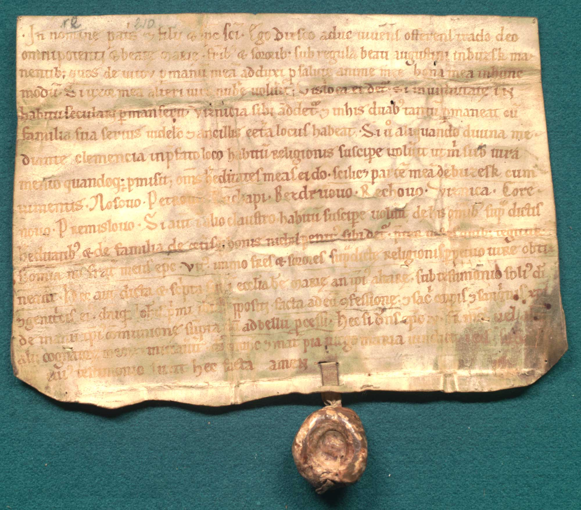 Dzierżek [Dirsco], rycerz, czyni testament nadając swe dobra klasztorowi norbertanek w Busku i czyniąc zapis na rzecz swej żony pod pewnymi warunkami. Język: łac. Opis zewnętrzny: oryg., 1 k. pergaminowa, 22 x 16 cm; pieczęć na pasku